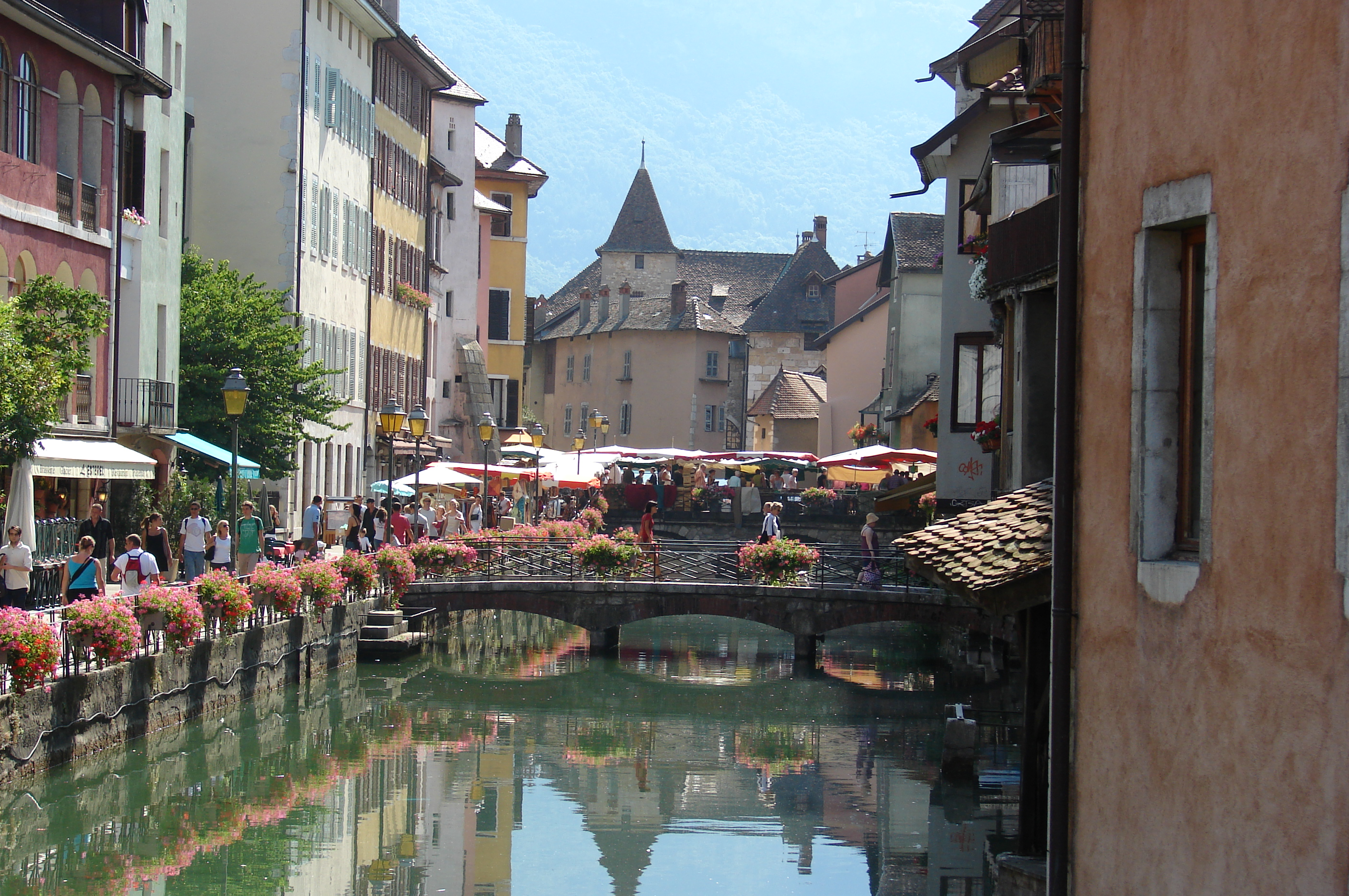 Annecy